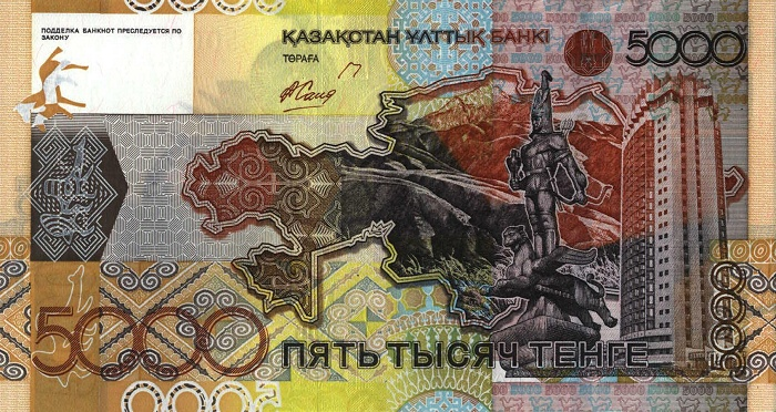 5.000 tenge